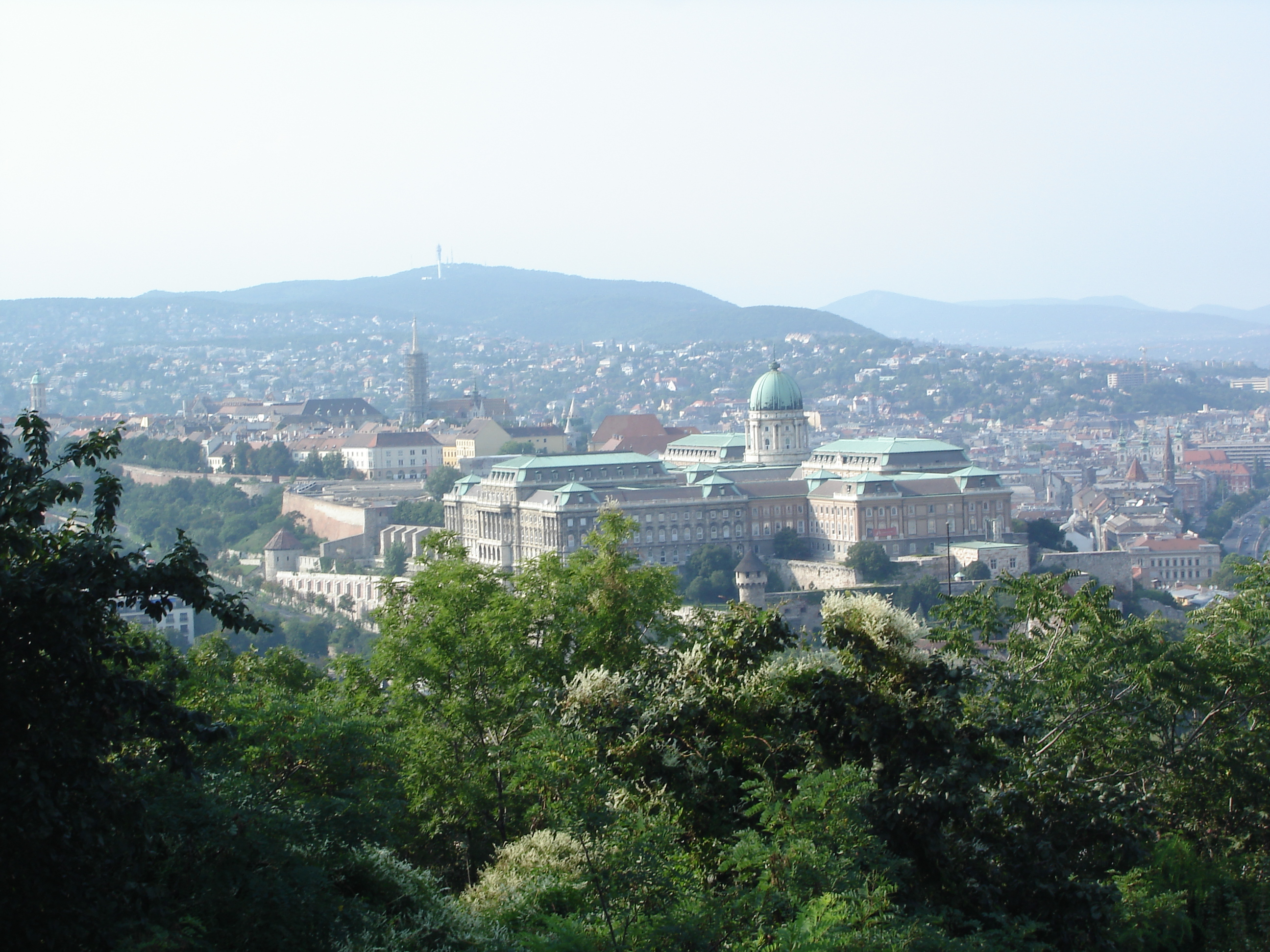 Widok na Zamek Królewski w Budapeszcie